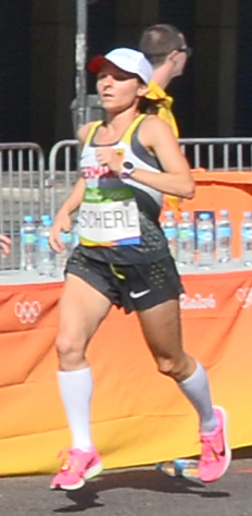 Passage du marathon des jeux olympiques de Rio 2016 dans le centre de Rio